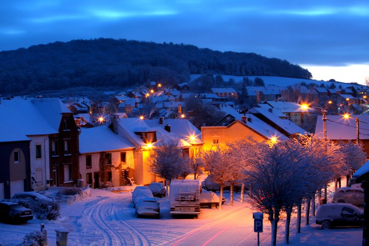 La place verte sous la neige au petit matin (décembre 2010)